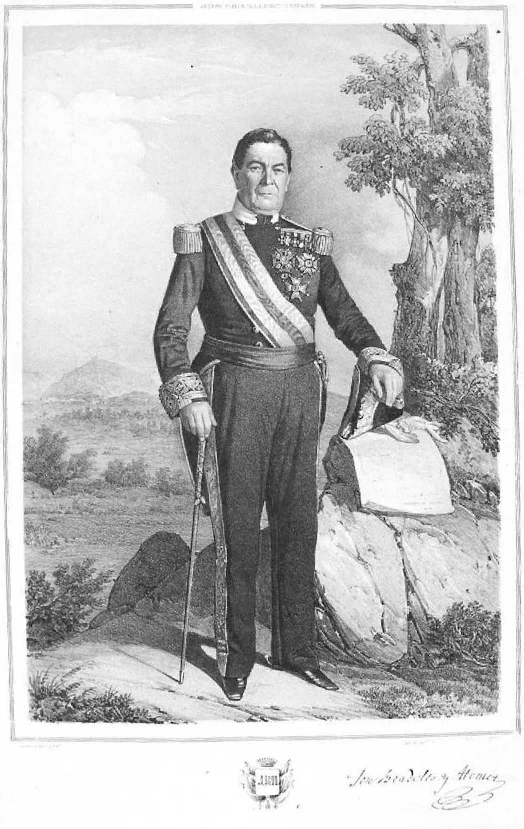 Retrato de José Boadella y Homet. Litografía de Domingo Valdivieso y Henarejos. Biblioteca Nacional de España.